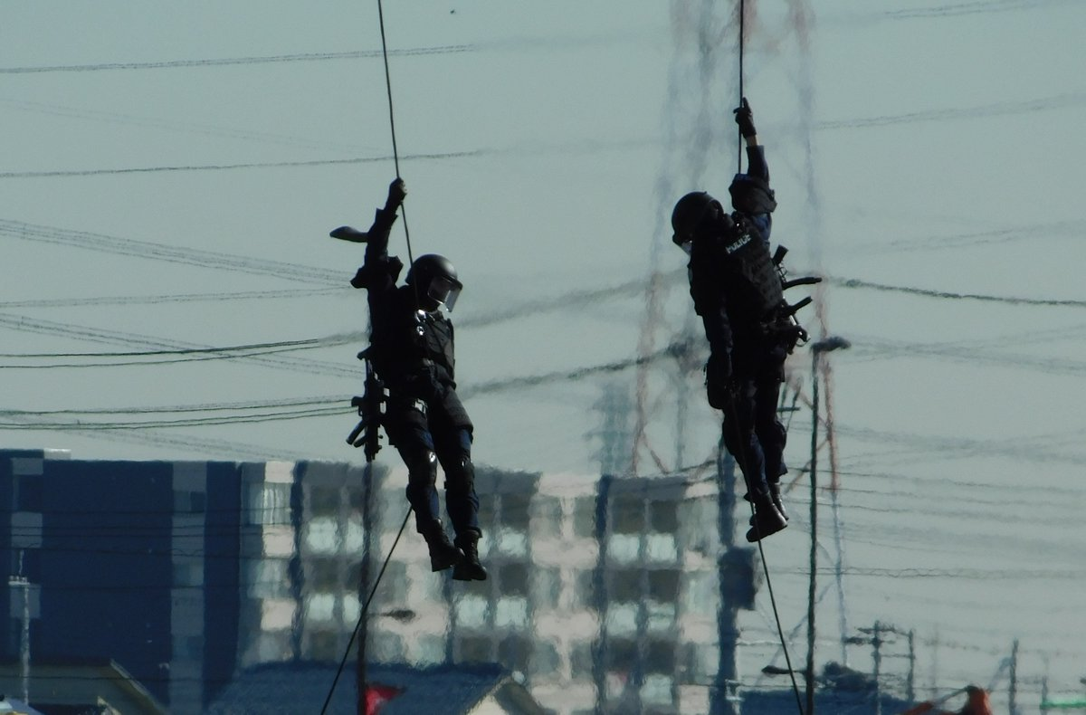 2017年の埼玉県警察年頭視閲式にて、県警航空隊のヘリコプター「むさし」より降下するRATS隊員。